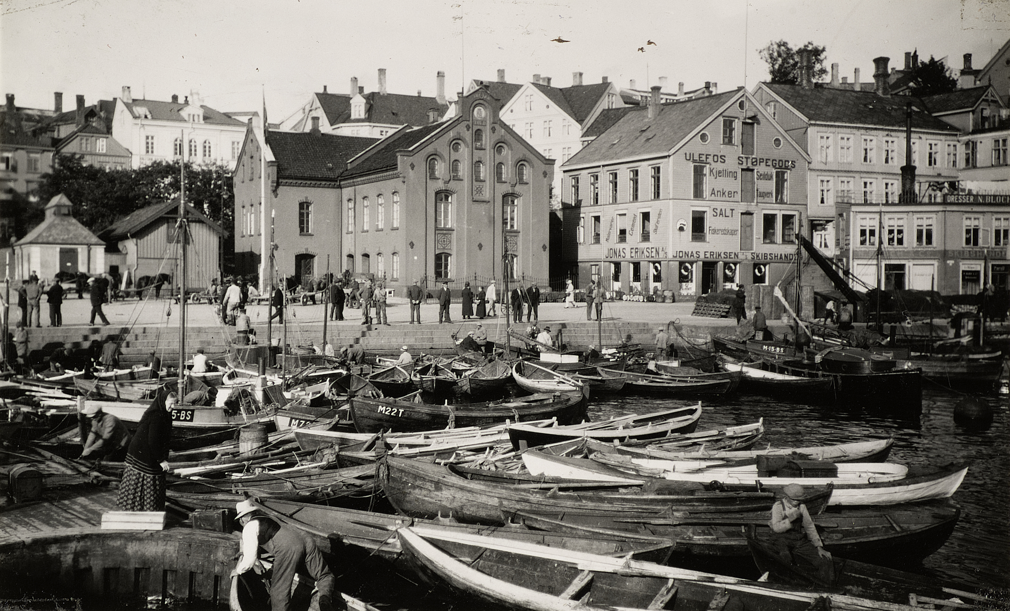 Bildet er hentet fra Arkivverket. Kristiansund havn. Fortøyde småbåter og skøyter. Førkrigsbebyggelse i bakgrunnen. Arkivinstitusjon : Riksarkivet Arkivnavn : Brente steders regulering Sted : NORGE, Møre og Romsdal, Kristiansund, Emneord: arkitektur, førkrigsbebyggelse, Båter, Mellomkrigstid, Mellomkrigstida, Havn, By Avbildet